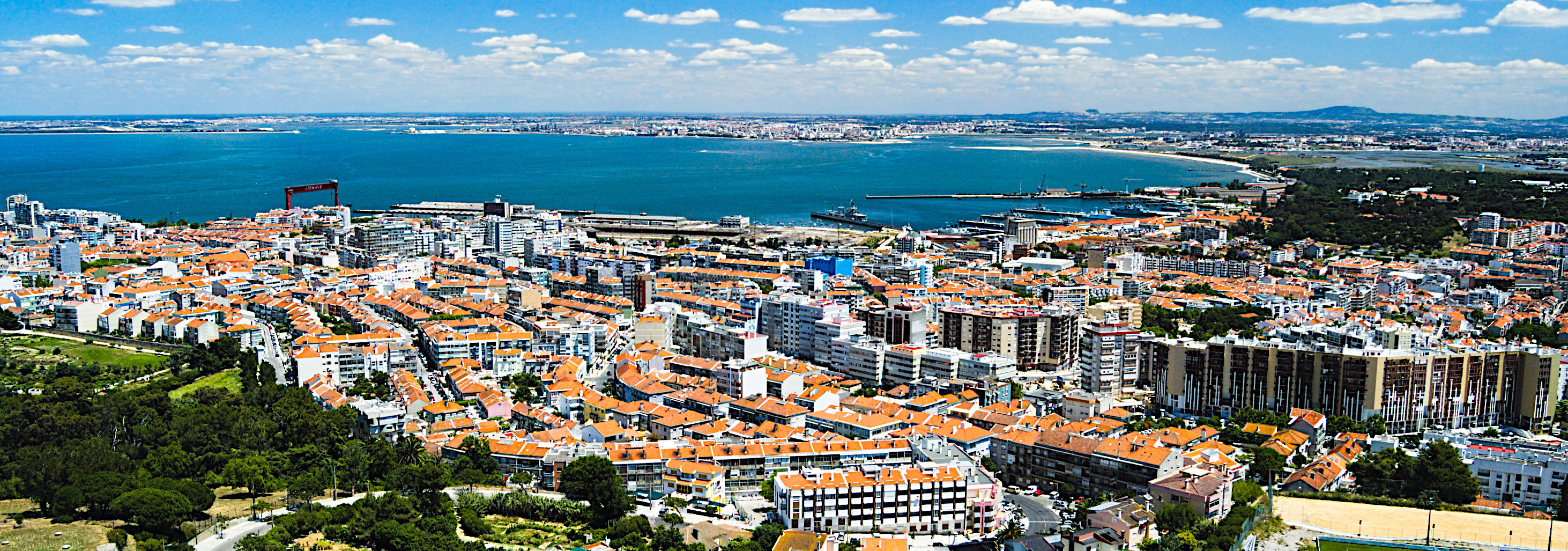 Almada vista do Cristo Rei, Portugal